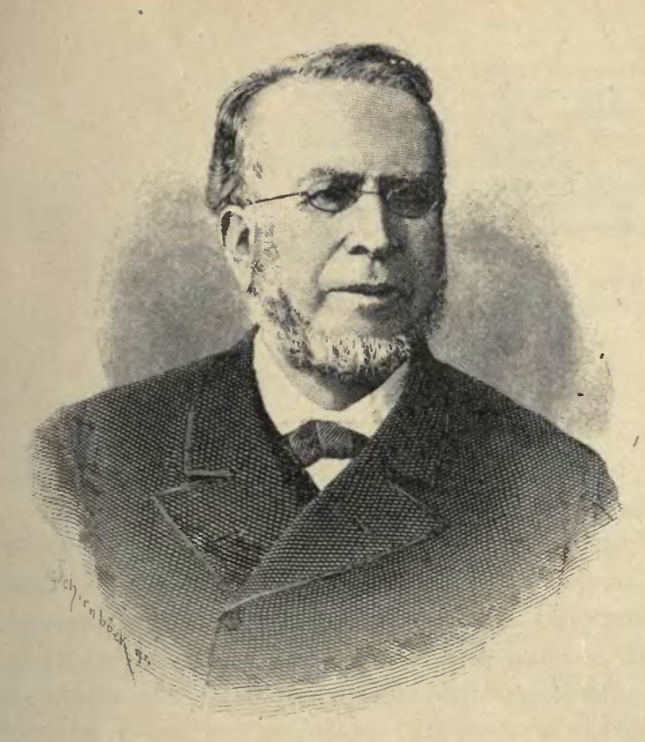 Conferencia sobre el Dr. Guillermo Rawson, su obra de legislador a higienista en ocasión del primer centenario de su natalicio (1921), de Eliseo Cantón (1861-1931).